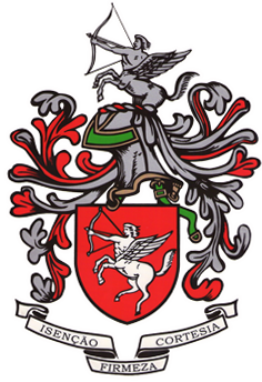 Brasão da BT